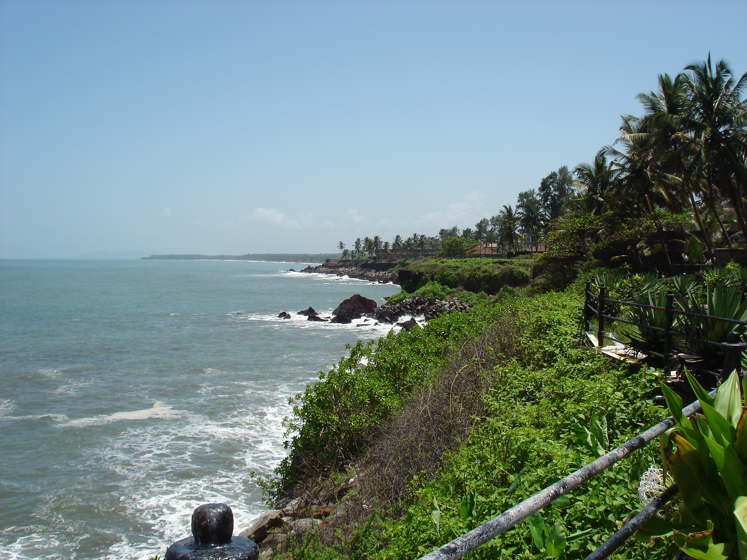 Kannur Guest House